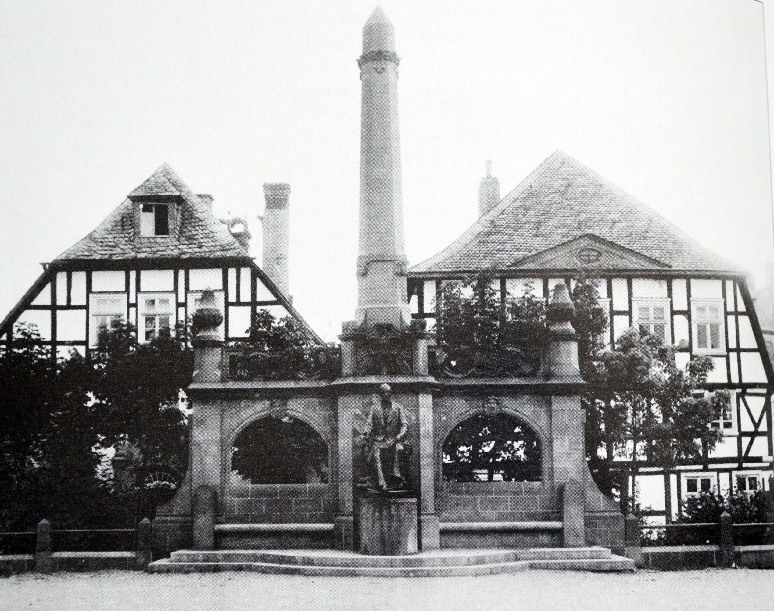 Pape-Denkmal in Brilon